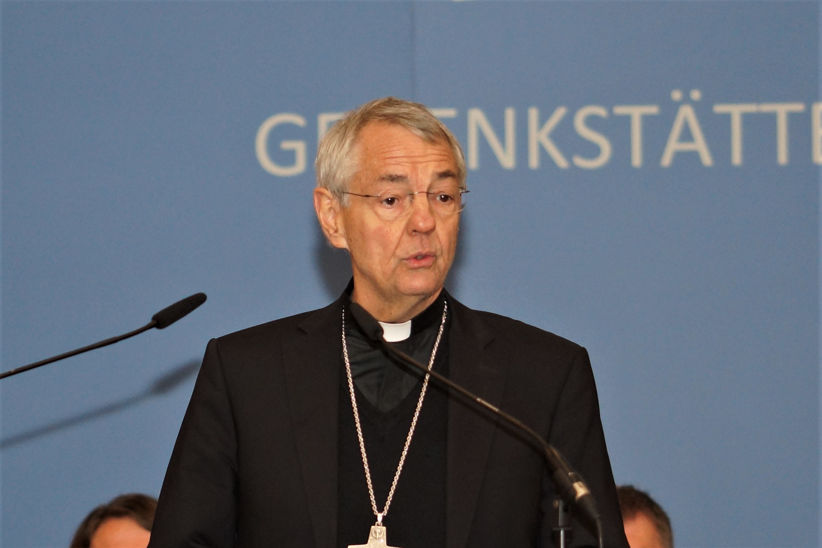 Erzbischof Ludwig Schick